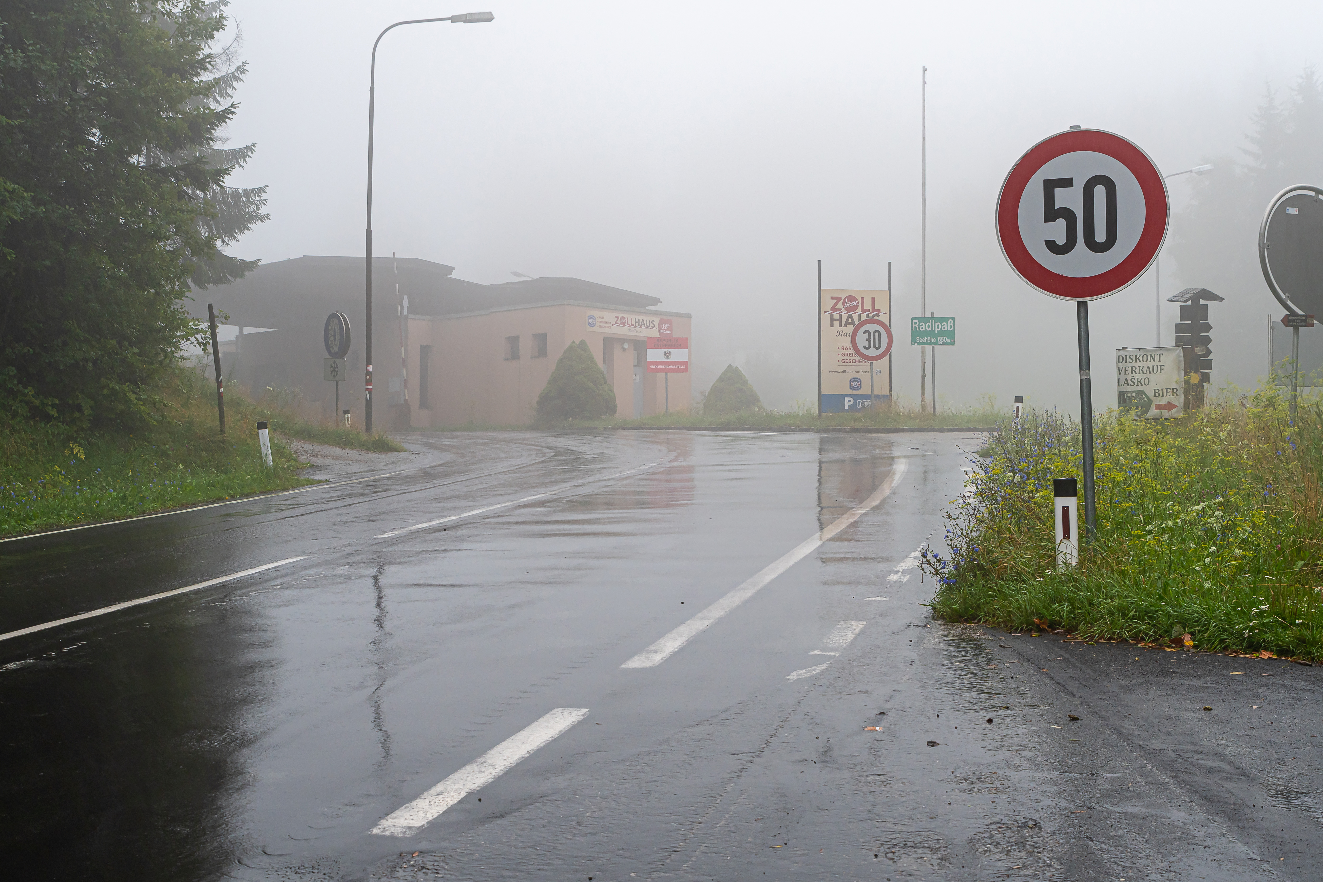 Der Radlpass verbindet die österreichische Steiermark mit der slowenischen Untersteiermark. 'Radl Pass' (Q641202)